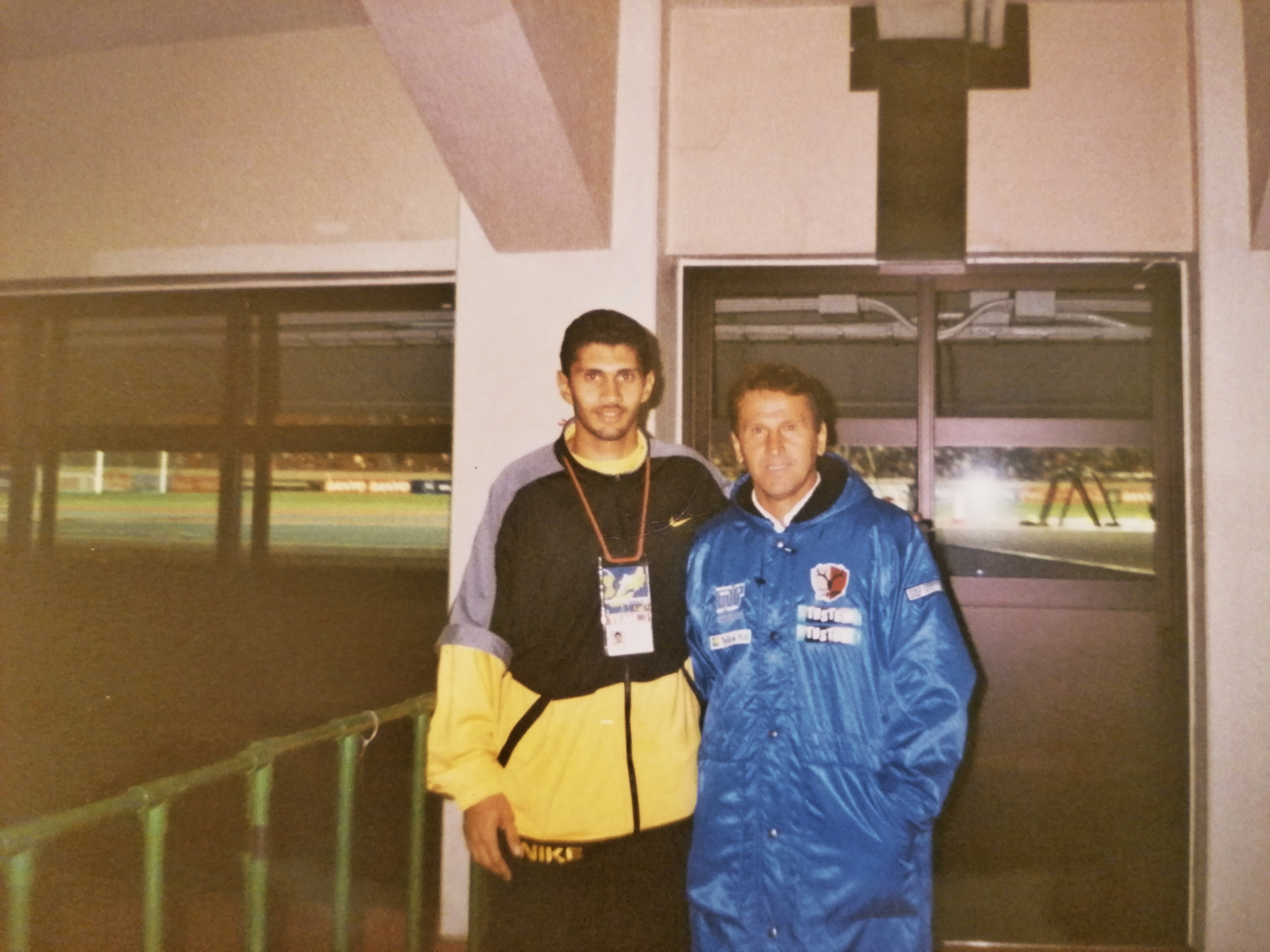 عمرو شاس مع لاعب البرازيلي السابق "زيكو" في اليابان عام 1999 ضمن تصفيات كأس الكؤوس الآسيوية